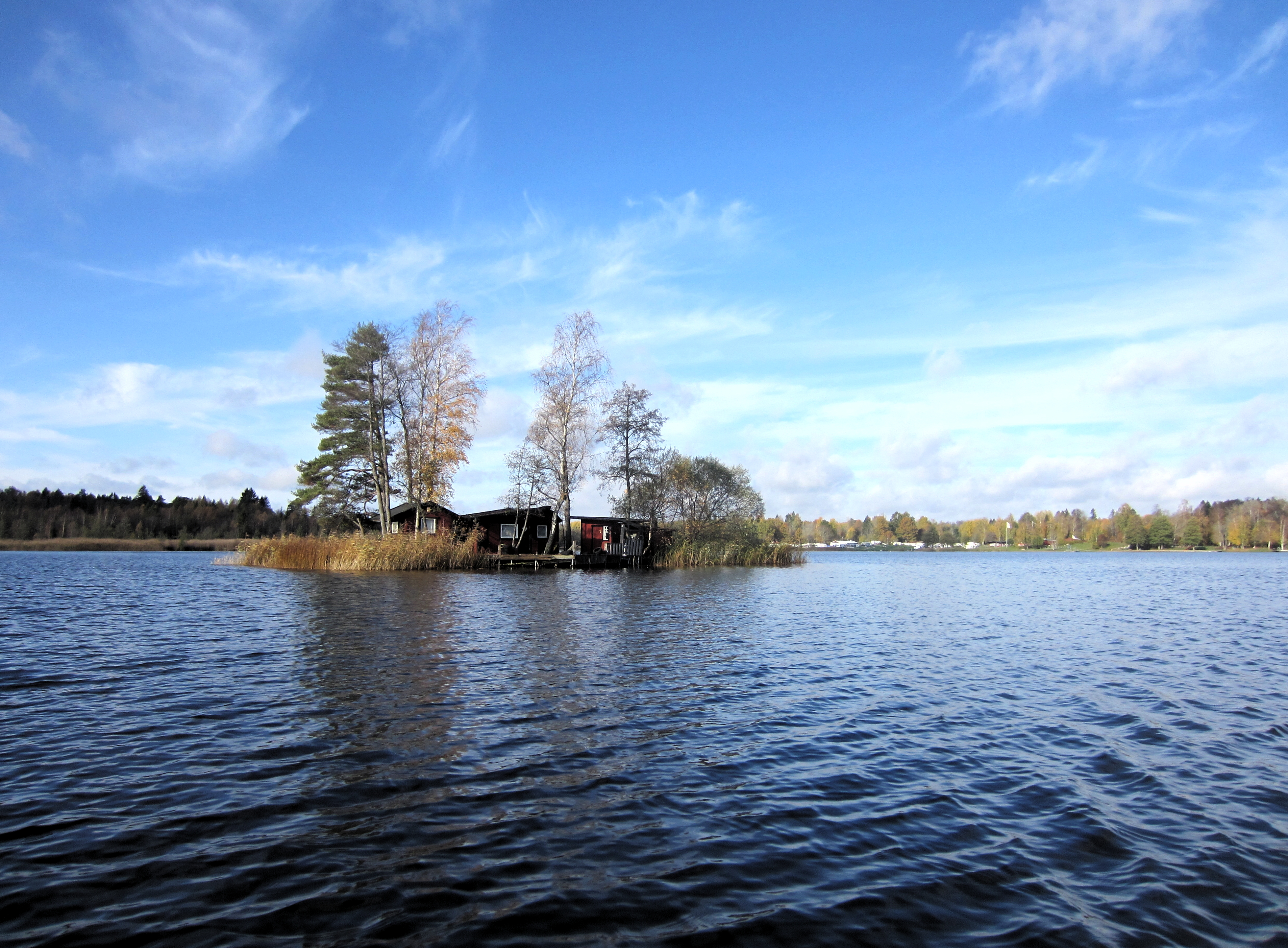 Djulösjön västerut mot Myrholmen